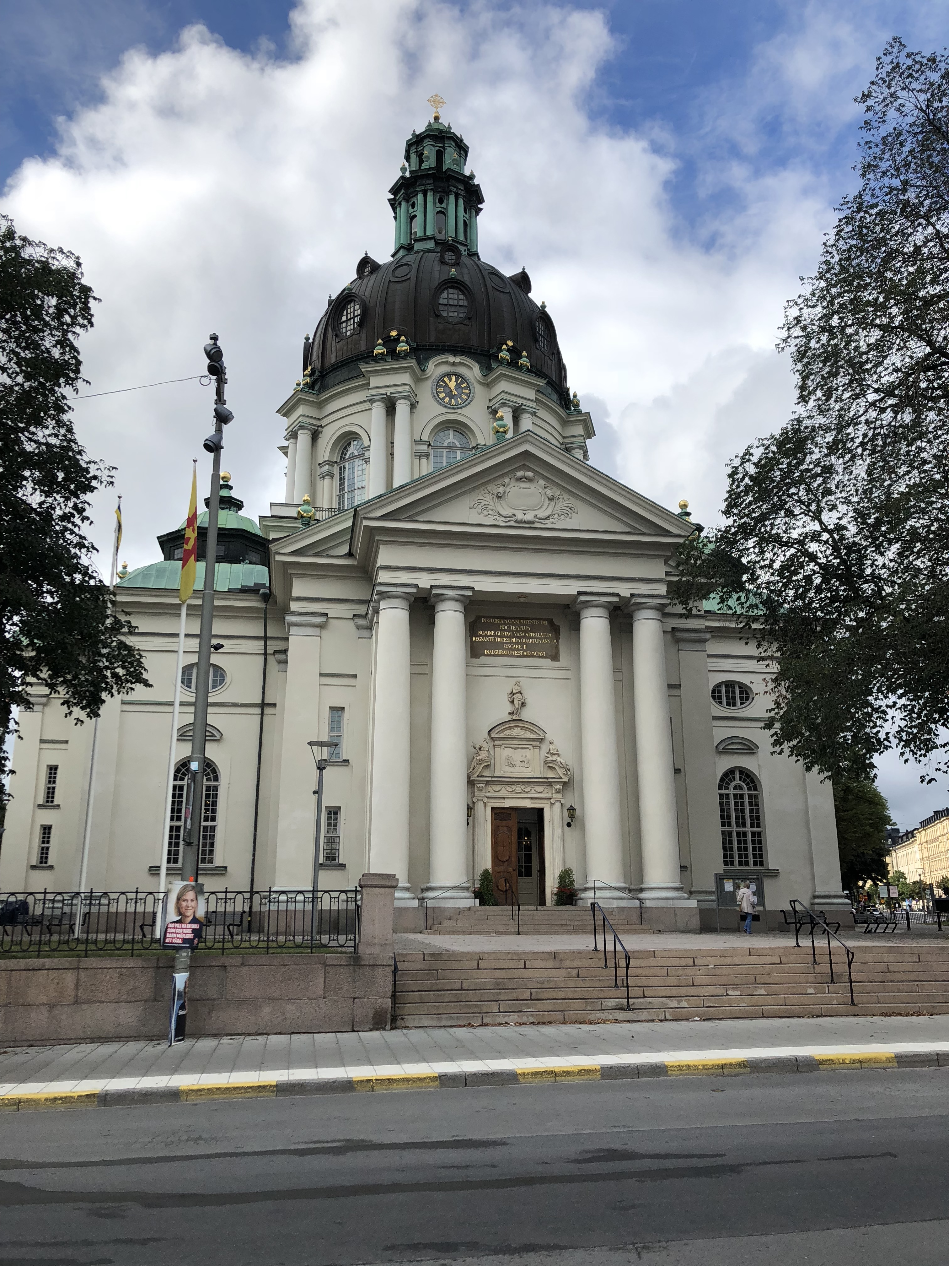 Gustaf Vasa kyrka i Stockholm, från Odenplan.